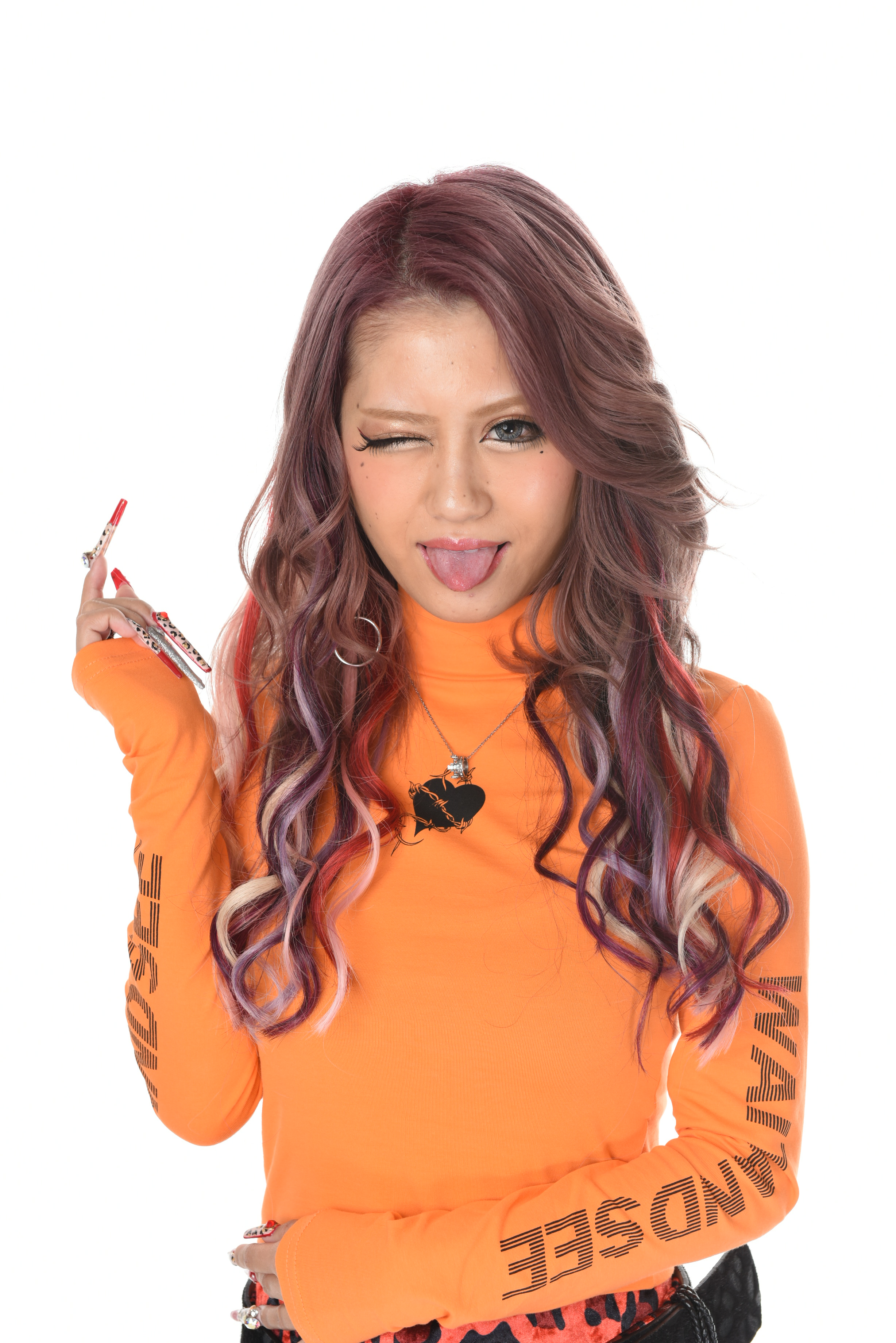 あいめろ本人、2019年9月写真スタジオにて撮影。